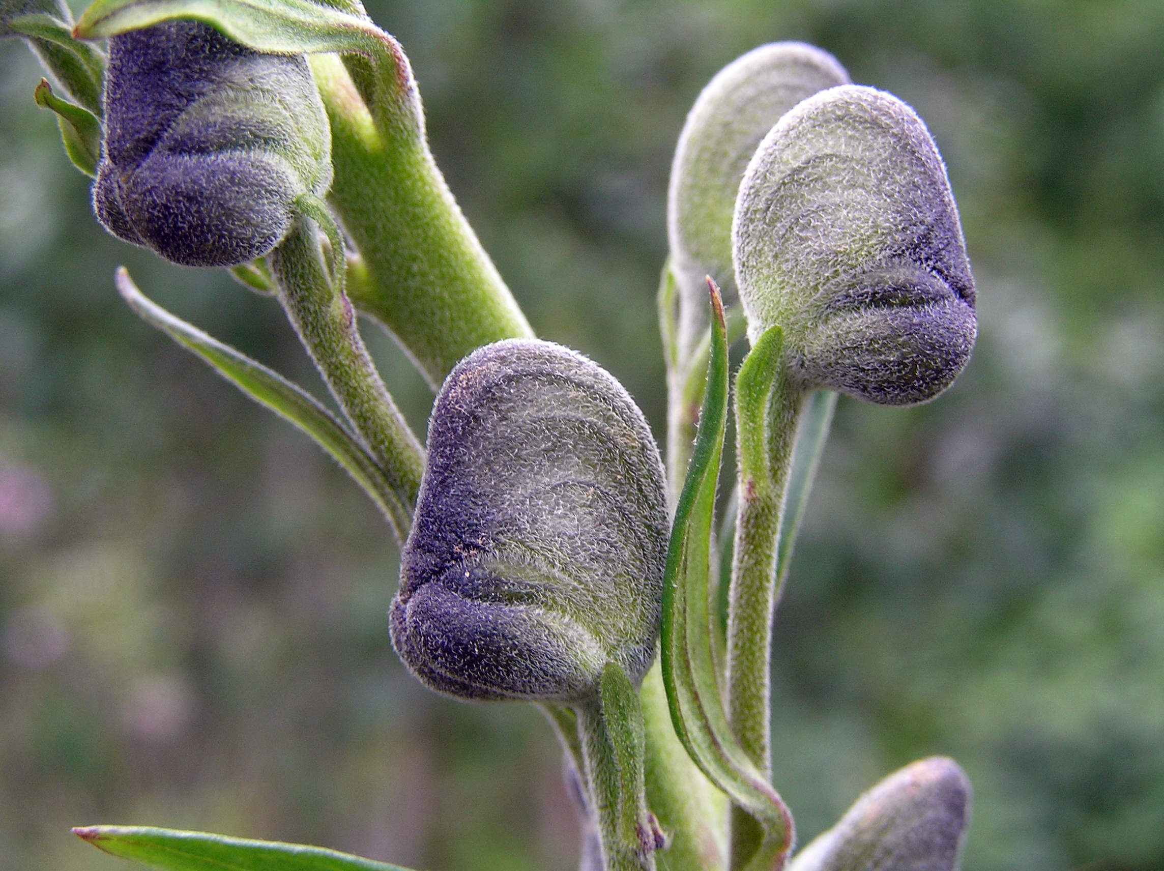 Sinise käokinga avanemata õied.